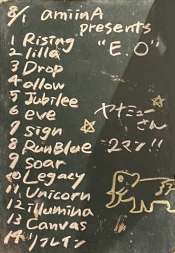 amiinAセトリボード